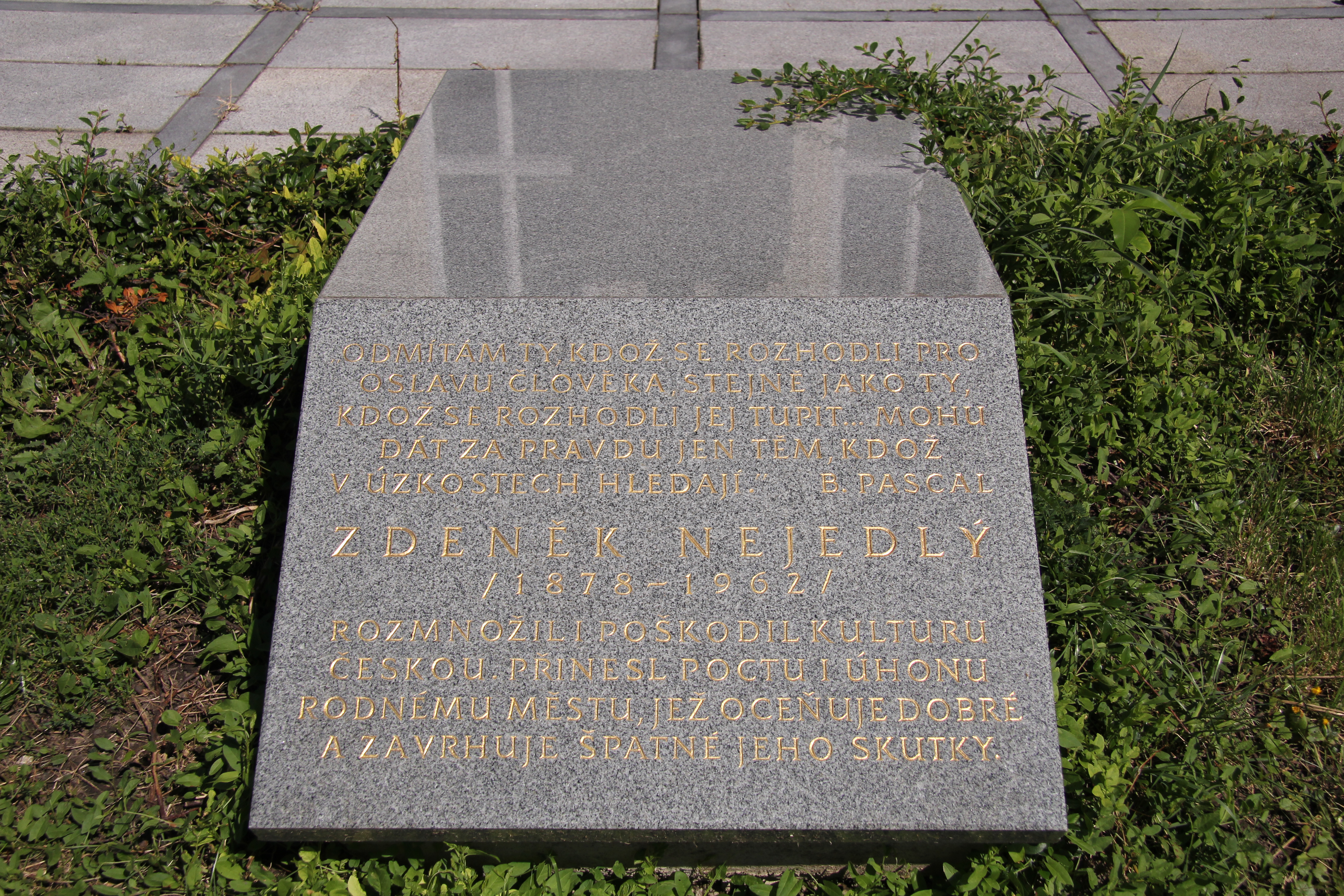 Deska u sochy Zdeňka Nejedlého od Jana Hány u 1. základní školy z roku 1978